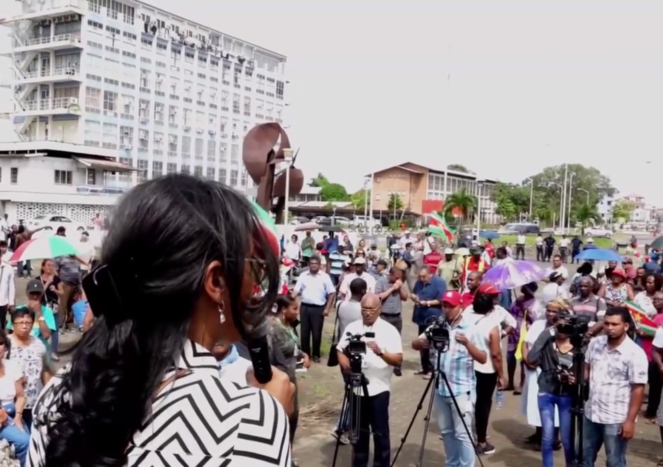 Xaviera Jessurun, 2018